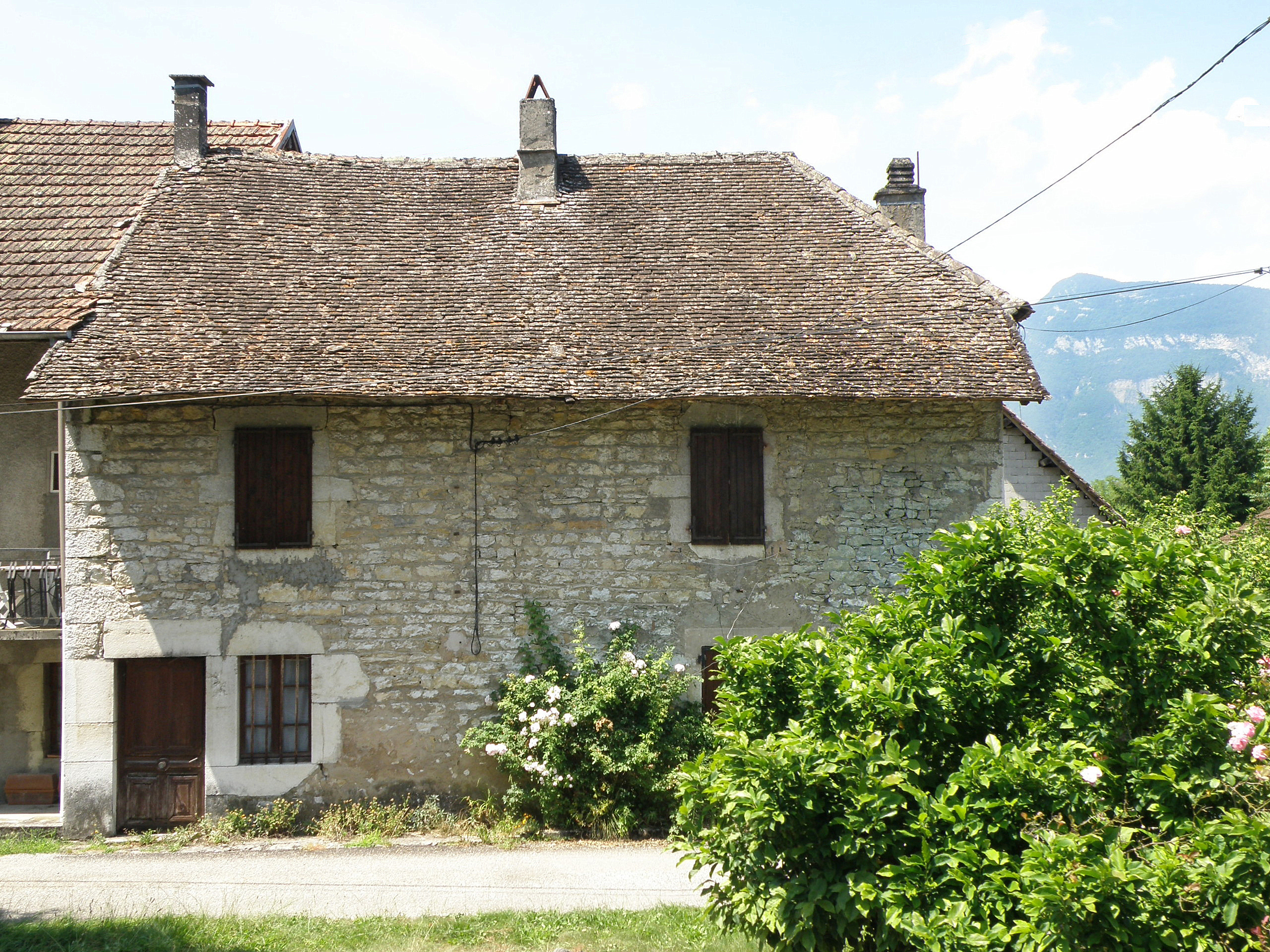 Vions, comm. de la Savoie (région Rhône-Alpes, France). Hameau des Granges, au bord du canal de Savières et à la lisière de la Chautagne.